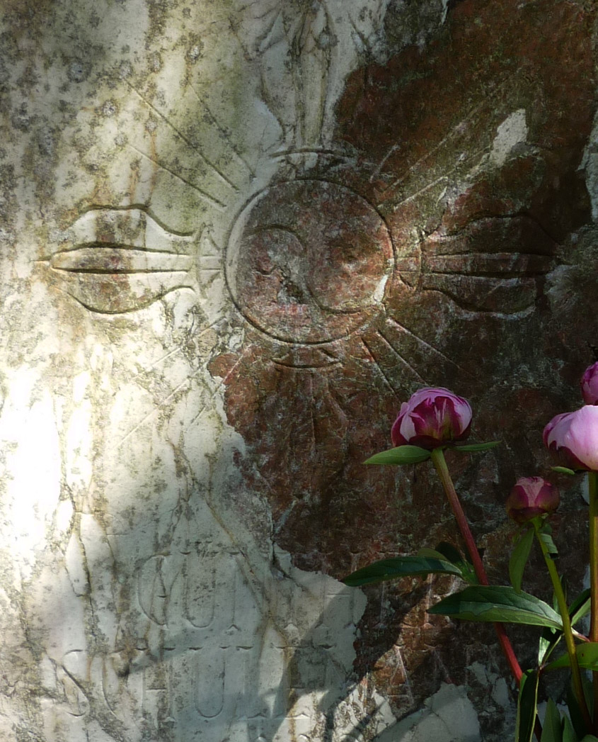 Grabstein Günther Schulemann (1889-1964) auf dem Loschwitzer Friedhof in Dresden-Loschwitz, wahrscheinlich ein Marmorbruchstück aus der katholischen Hofkirche in Dresden